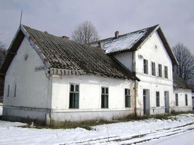 Stajalište Vojnovac na ličkoj pruzi